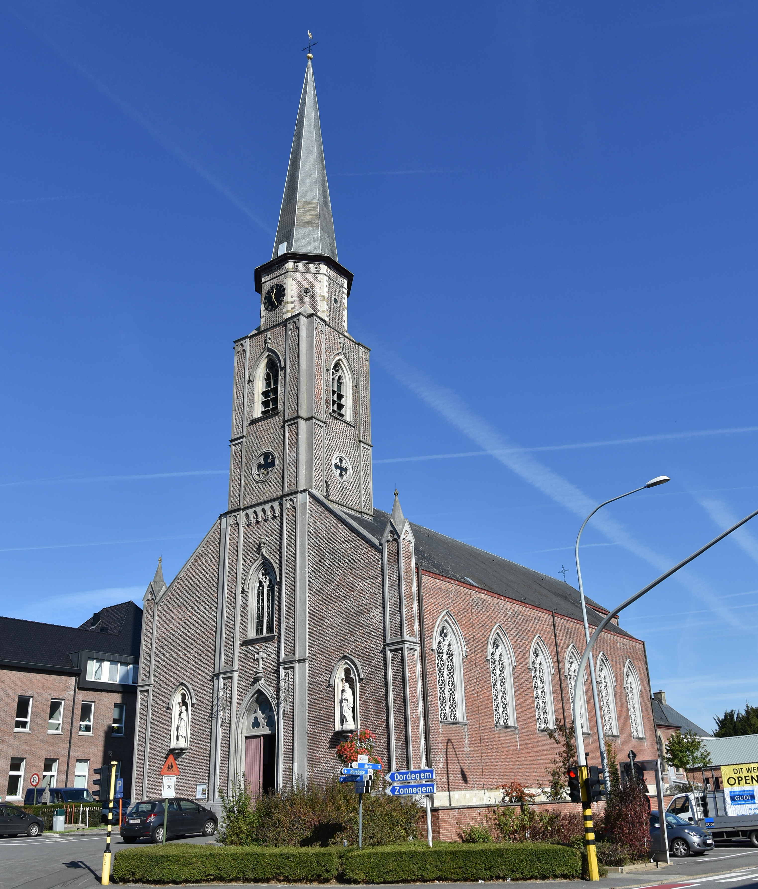 Sint-Martinuskerk (Burst) 5-10-2018 12-24-34 This photo of immovable heritage has been taken in the Flemish Region